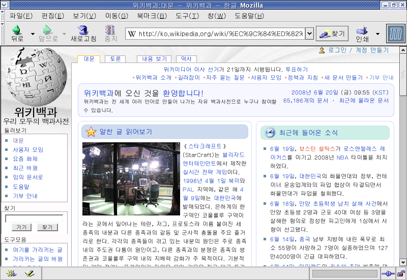 모질라 1.7.6